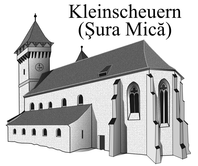 Biserica fortificata din Sura Mica